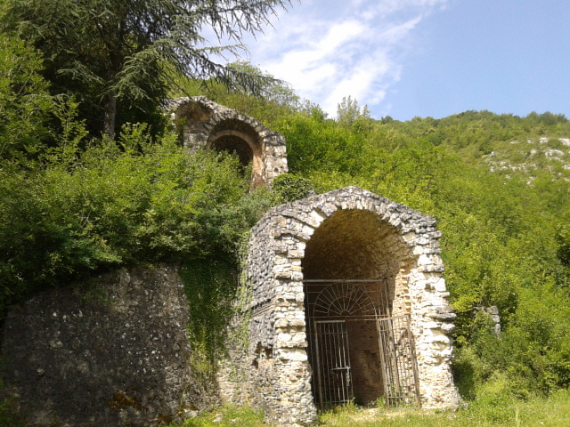 Le tre bocche del cunicolo maggiore